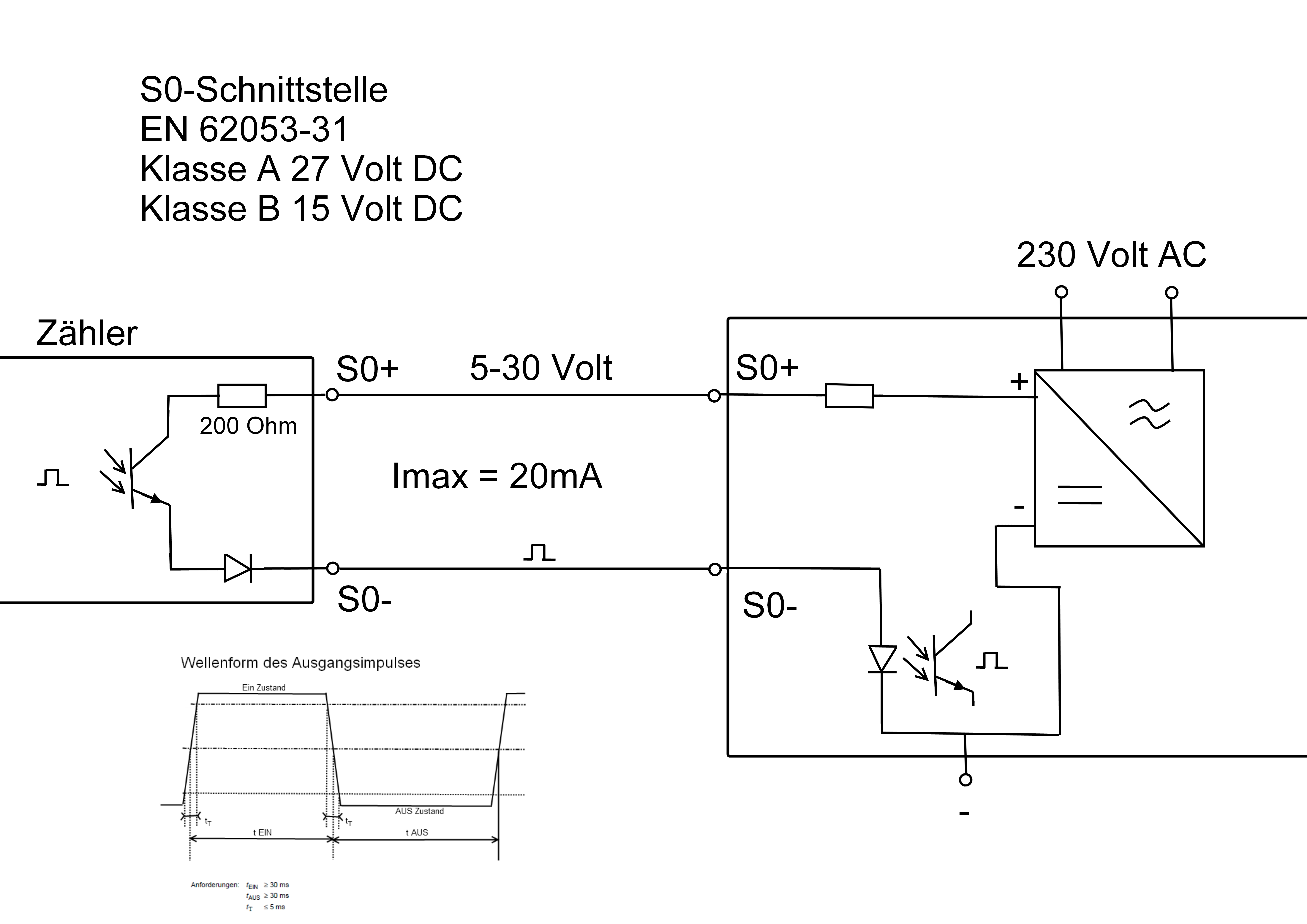 So-Schnittstelle EN 62053-31